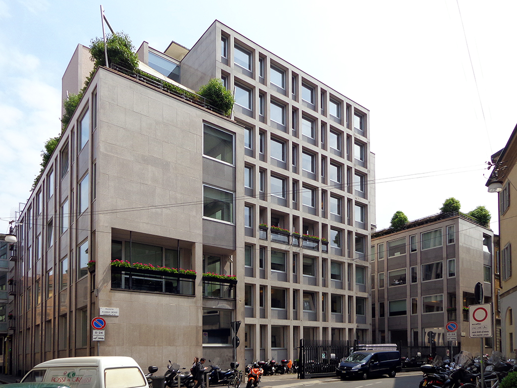 Edificio per uffici a Milano, in via Filodrammatici 2 (angolo via Arrigo Boito). Fu costruito dal 1956 al 1957 su progetto di P.G. Bosisio, U. Busca, G. Casalis, Pietro Lingeri e C. Maltini.